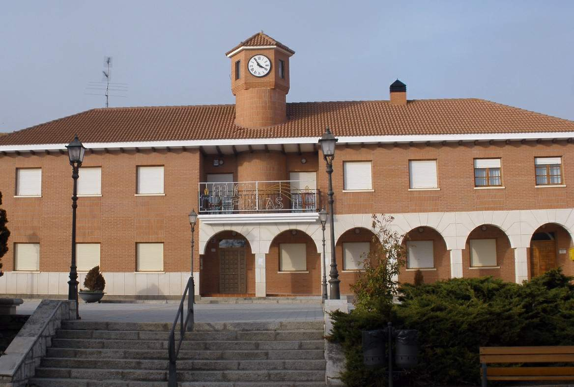 Ayuntamiento de Fuensaldaña (Valladolid)